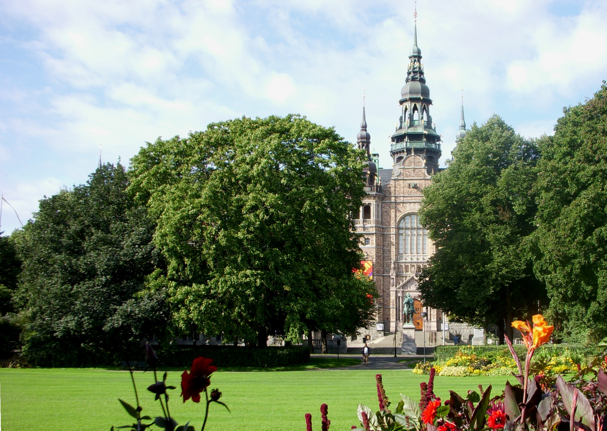 Nordiska museet med "Lejonslätten famför"